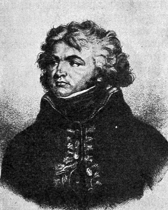 Жан-Батист Клебер. Это изображение было использовано для иллюстрирования статьи «Клебер, Жан-Батист» опубликованной в двенадцатом томе «Военной энциклопедии», который был издан книгоиздательским товариществом И. Д. Сытина в 1913 году в столице Российской империи городе Санкт-Петербурге. Более подробное описание к этой картинке можно прочесть в указанной выше статье.